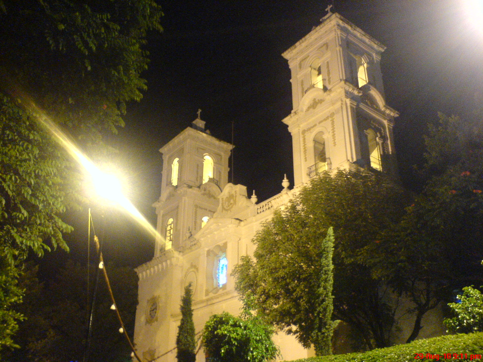 La catedral de Chilpancingo, Guerrero en México esta consagrada a la virgen de "La Asucion de María", es de estilo neoclasico y en su interior se llevo a cabo el Primer Congreso de Anáhuac. Se ubica en la plaza cívica que lleva este ultimo nombre.